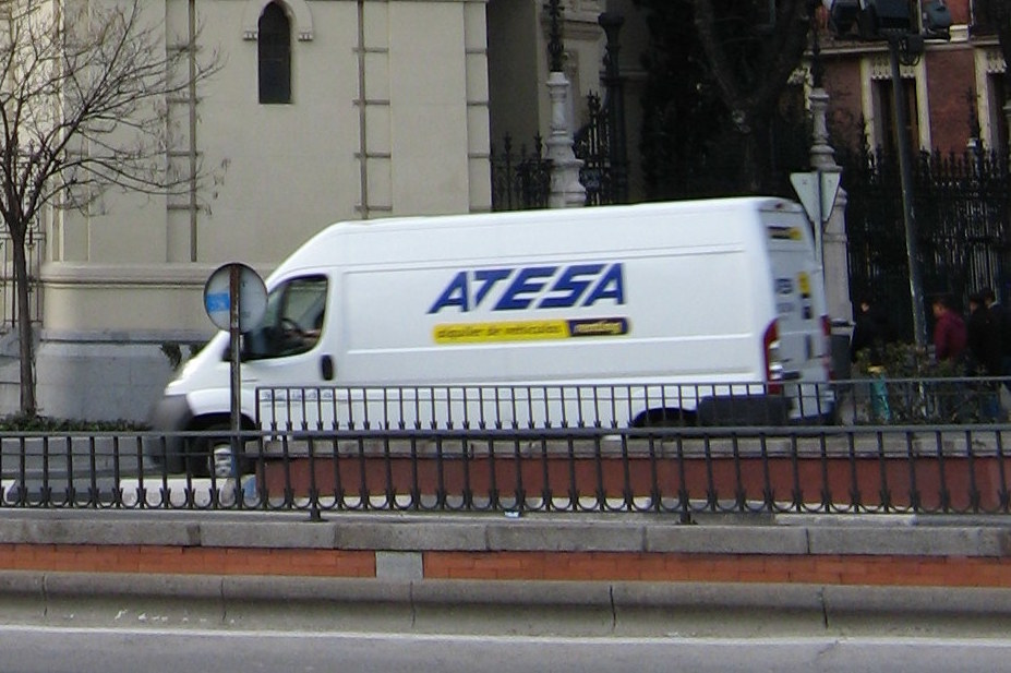 Parroquia de San Manuel y San Benito Madrid Comunidad de Madrid España